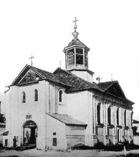 Георгіївська церква Києва.: Вигляд храму до перебудови кінця 19 ст. Нині церква не існує.